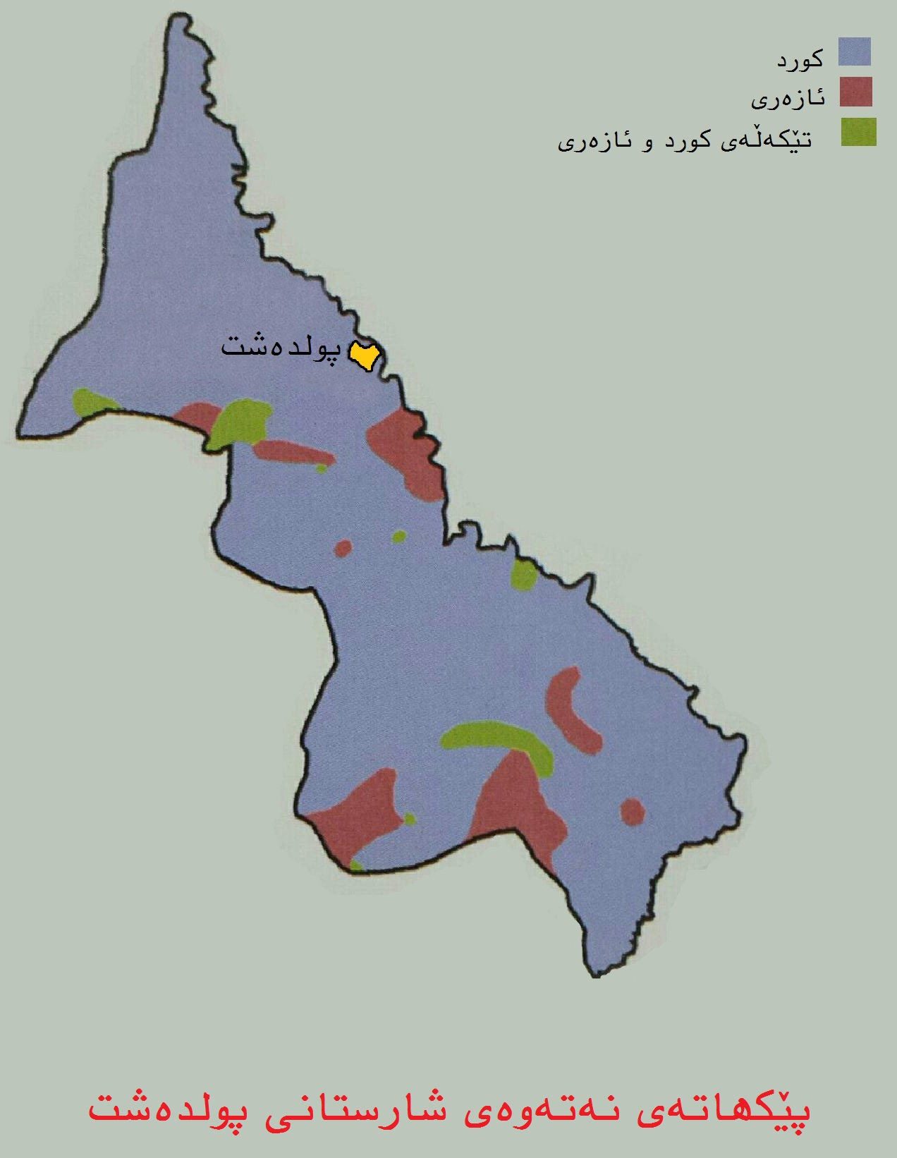 کوردی: شارستانی پۆلدەشت